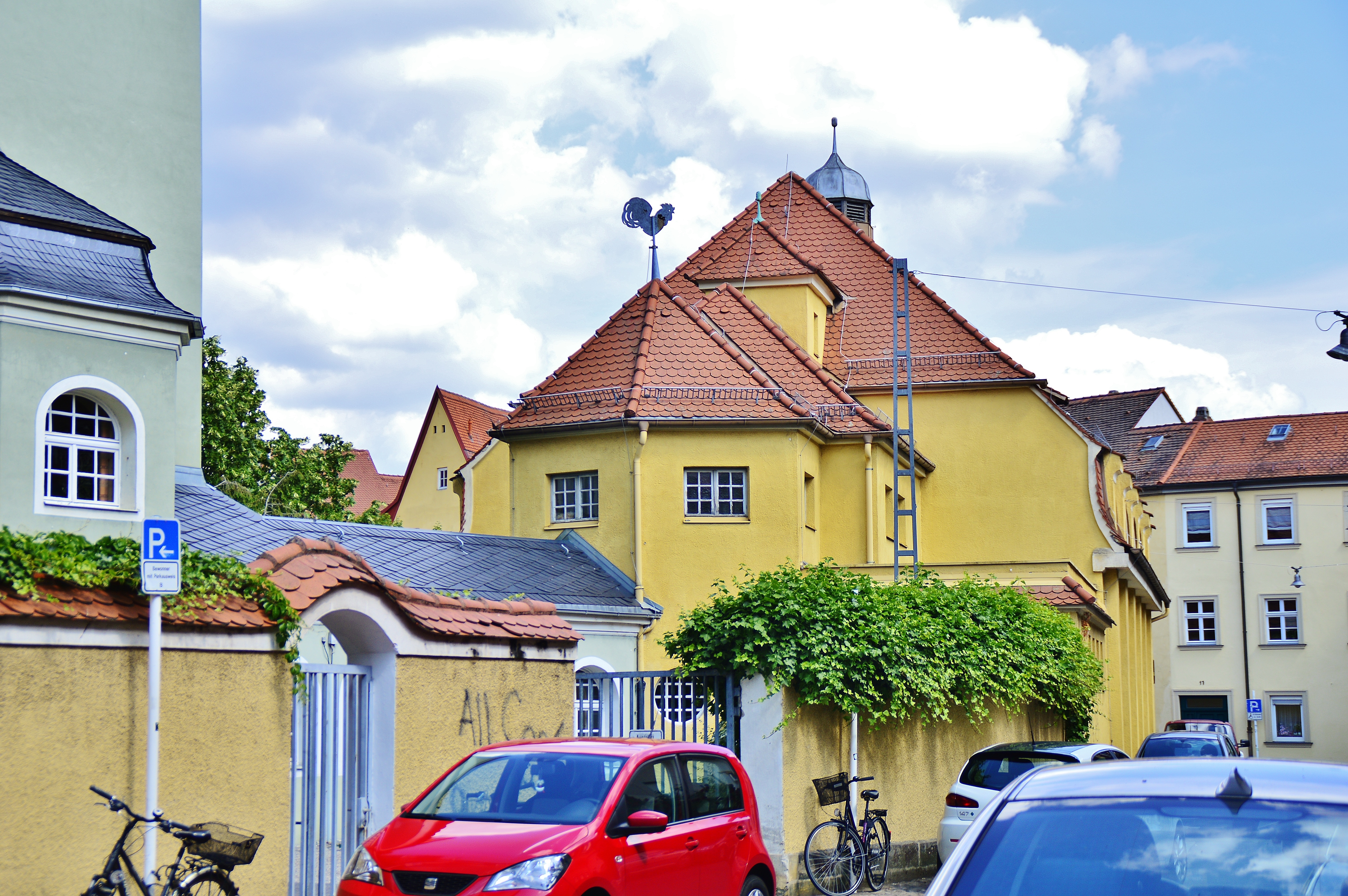 Turnhalle der Martinschule Bamberg